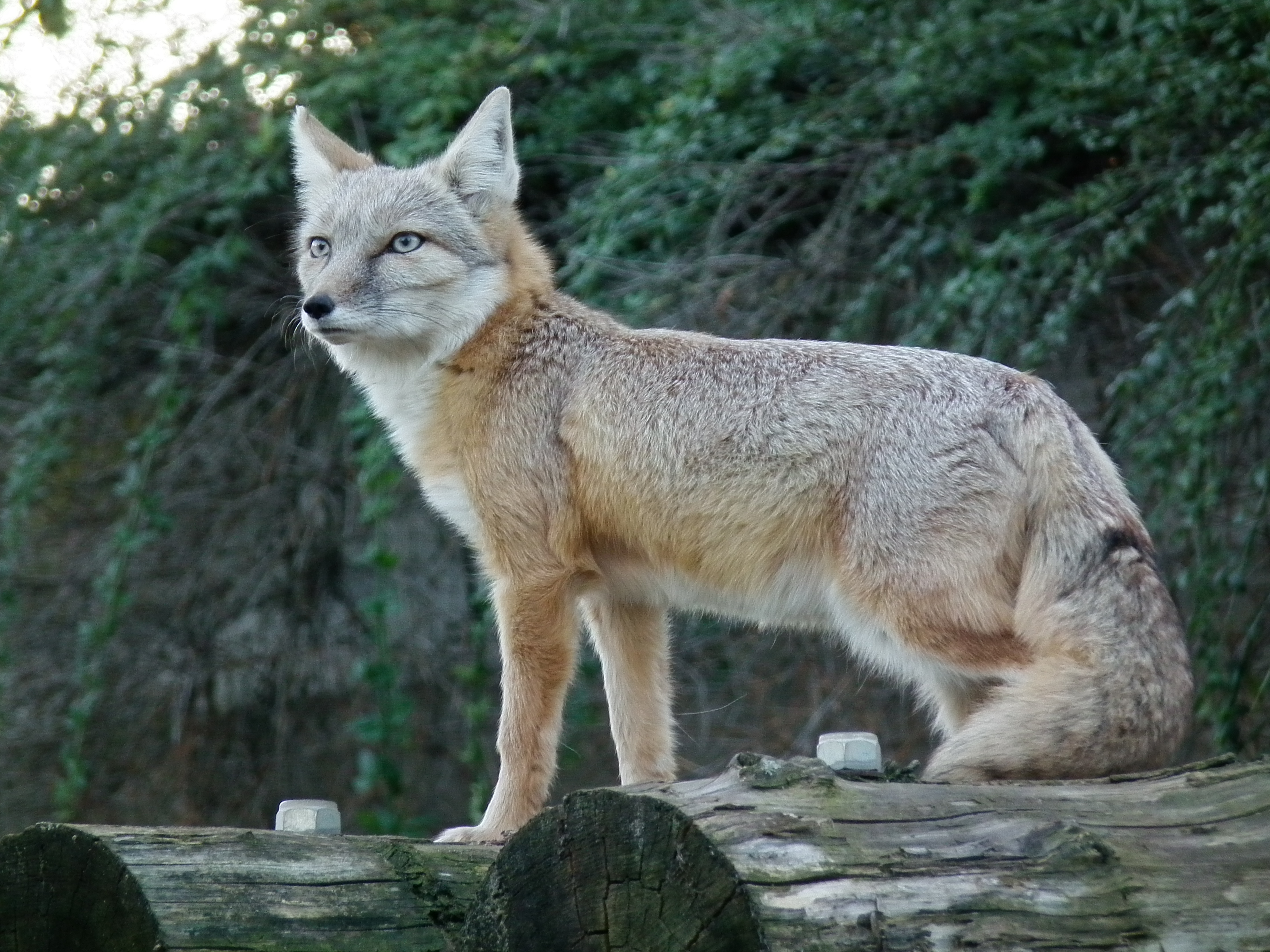 Steppenfuchs (Vulpes corsac) im Heidelberger Tiergarten (Baden-Württemberg, Deutschland)